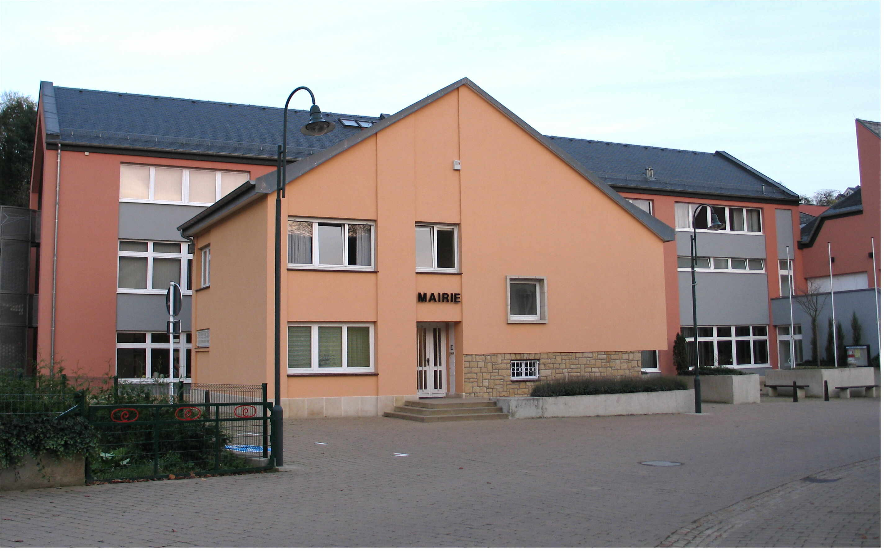 D'Gemengenhaus vun der Gemeng Waldbredimus zu Trënteng.